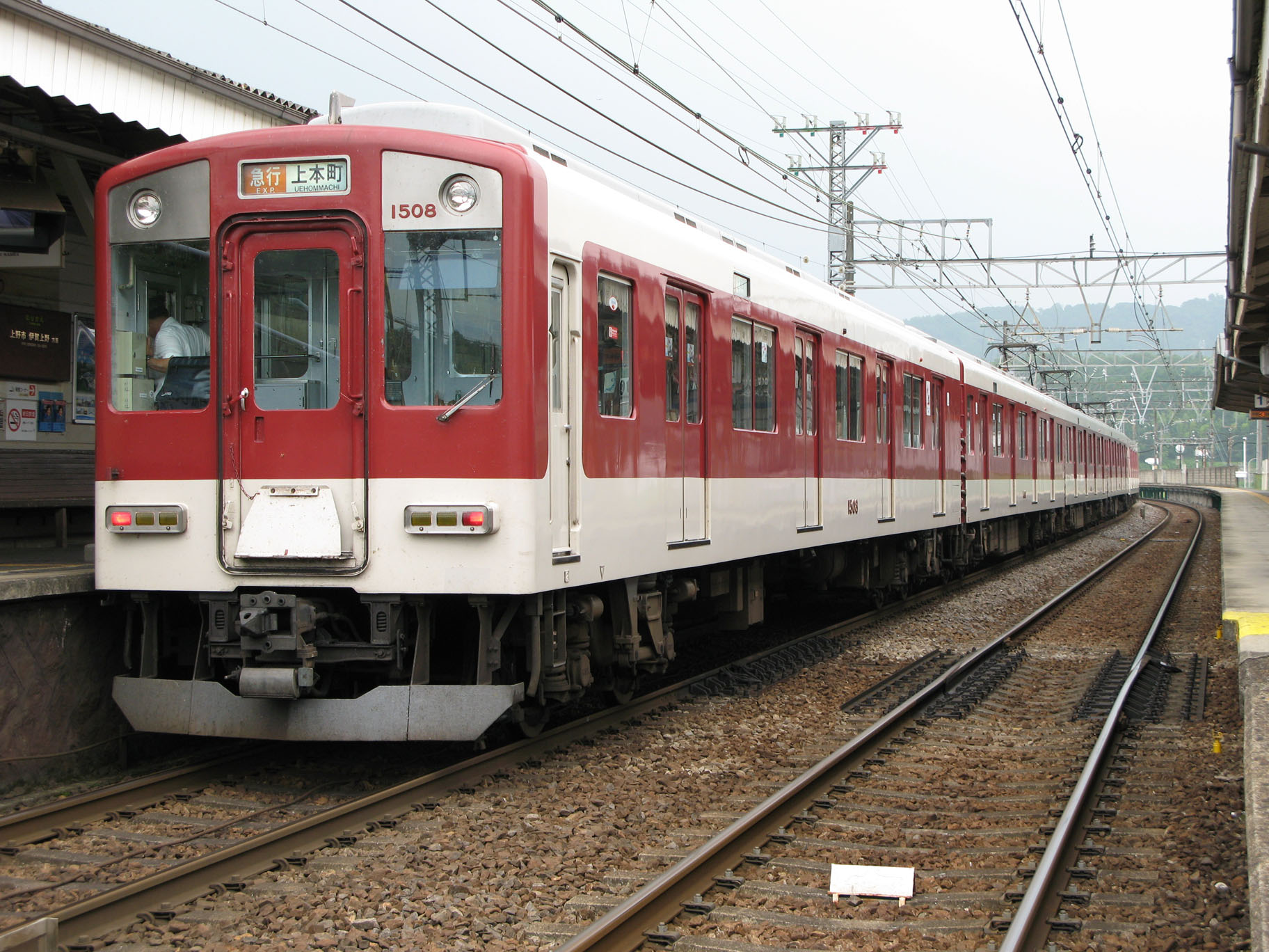 近鉄1400系電車